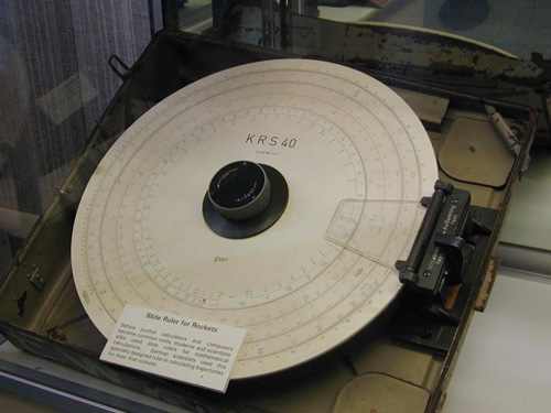 Sliderule.